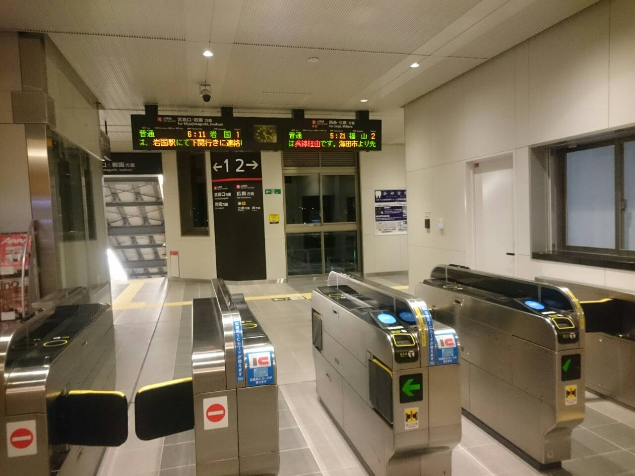 改札口です。